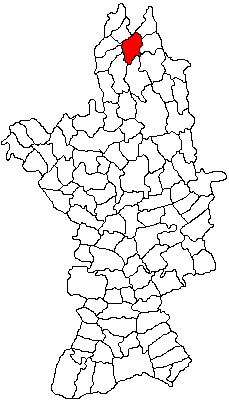 Categorie:Hărţi ale judeţului Olt